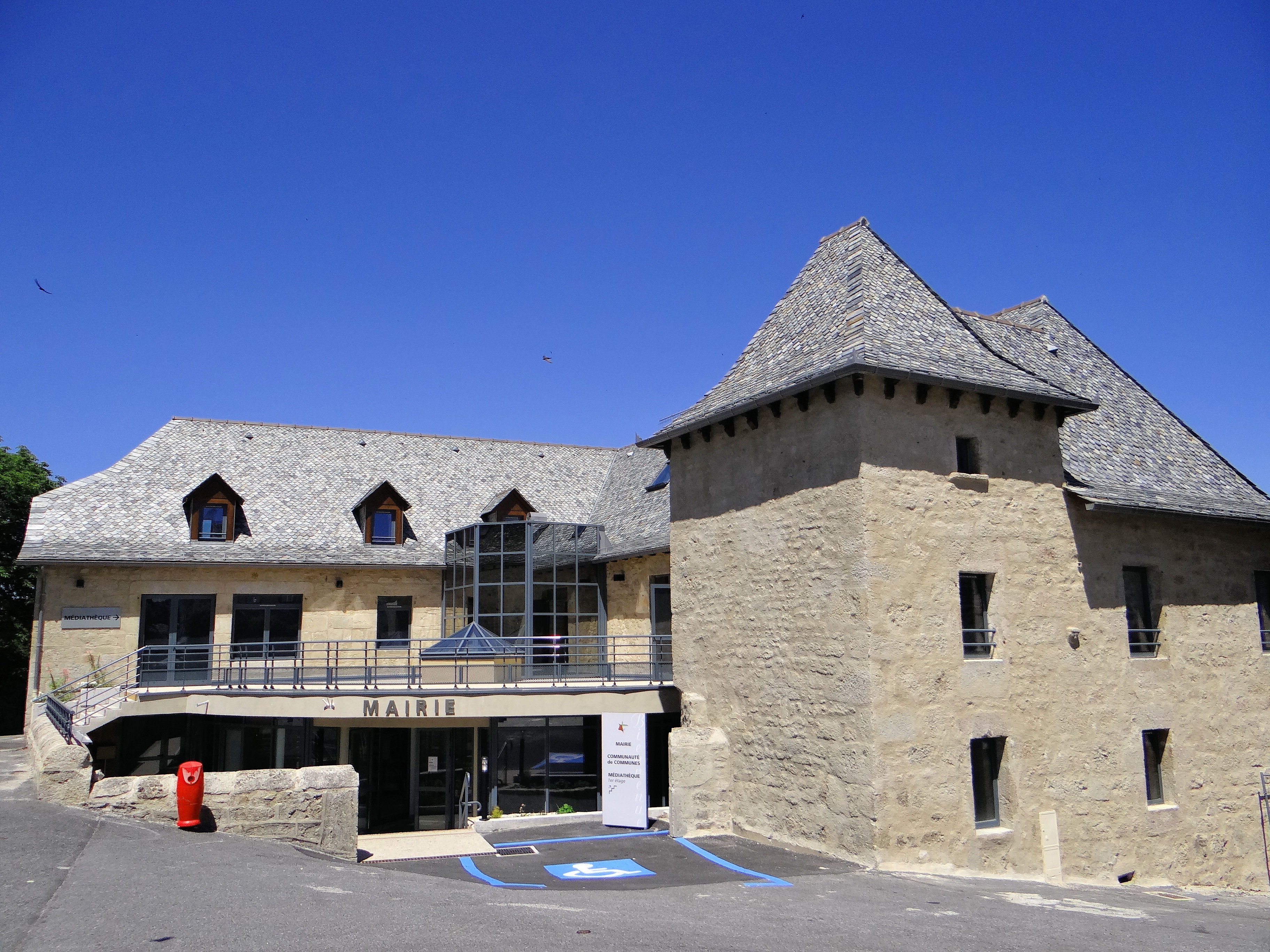 Sainte-Geneviève-sur-Argence - Mairie